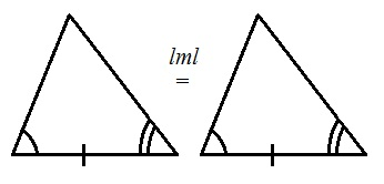 Trijstūru vienādības pazīme lml